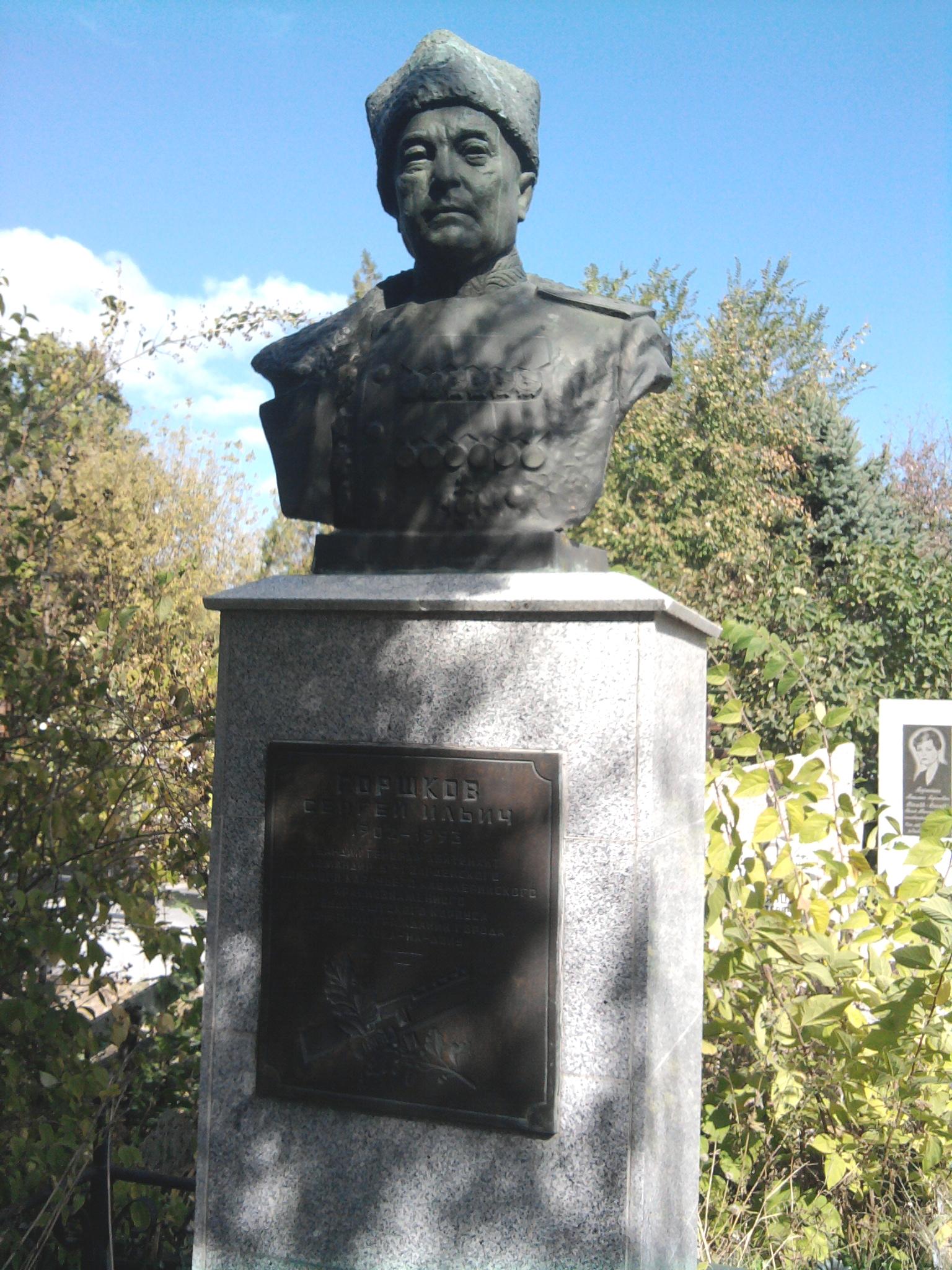 Памятник на могиле генерала-лейтенанта Горшкова Сергея Ильича на Северном кладбище Ростова-на-Дону